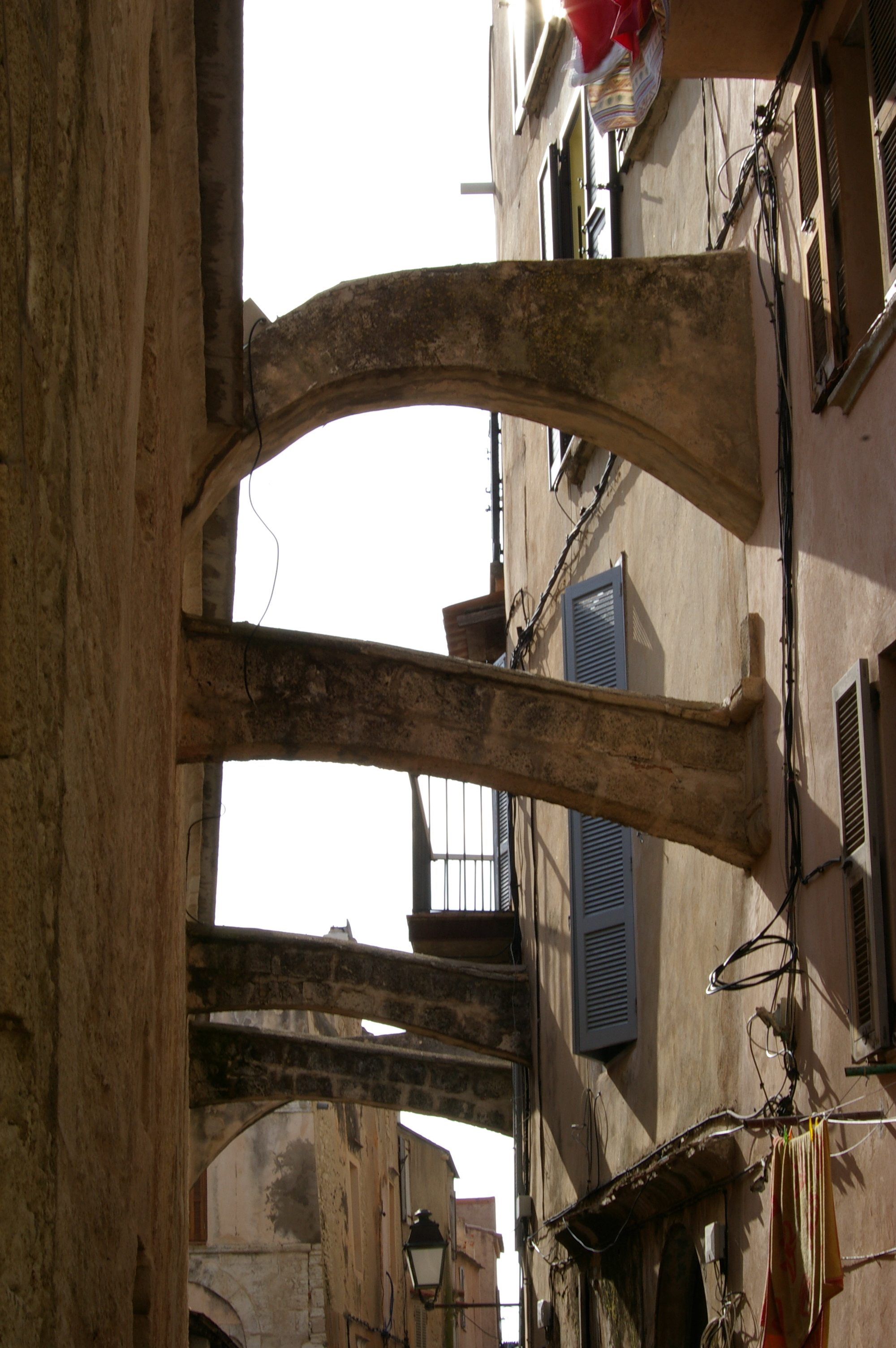 Bonifacio (Corse-du-Sud, France) (géo-localisation approximative !)